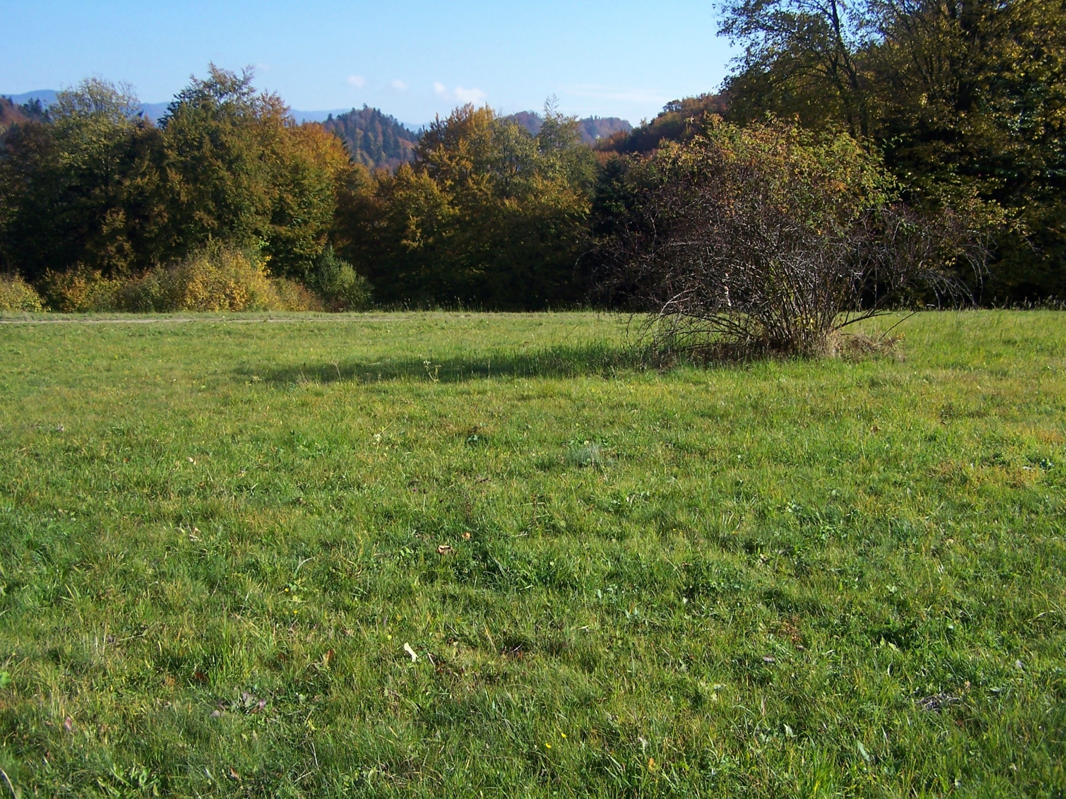 Polana Wyrobek w Pieninach